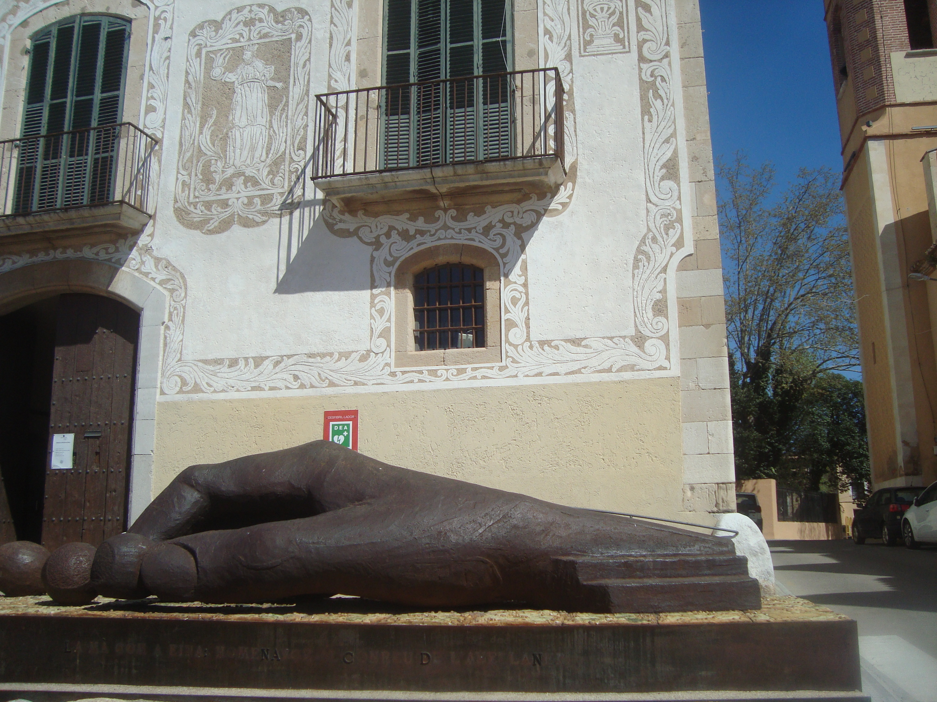 Casal de los Montoliu, (El Castillo)